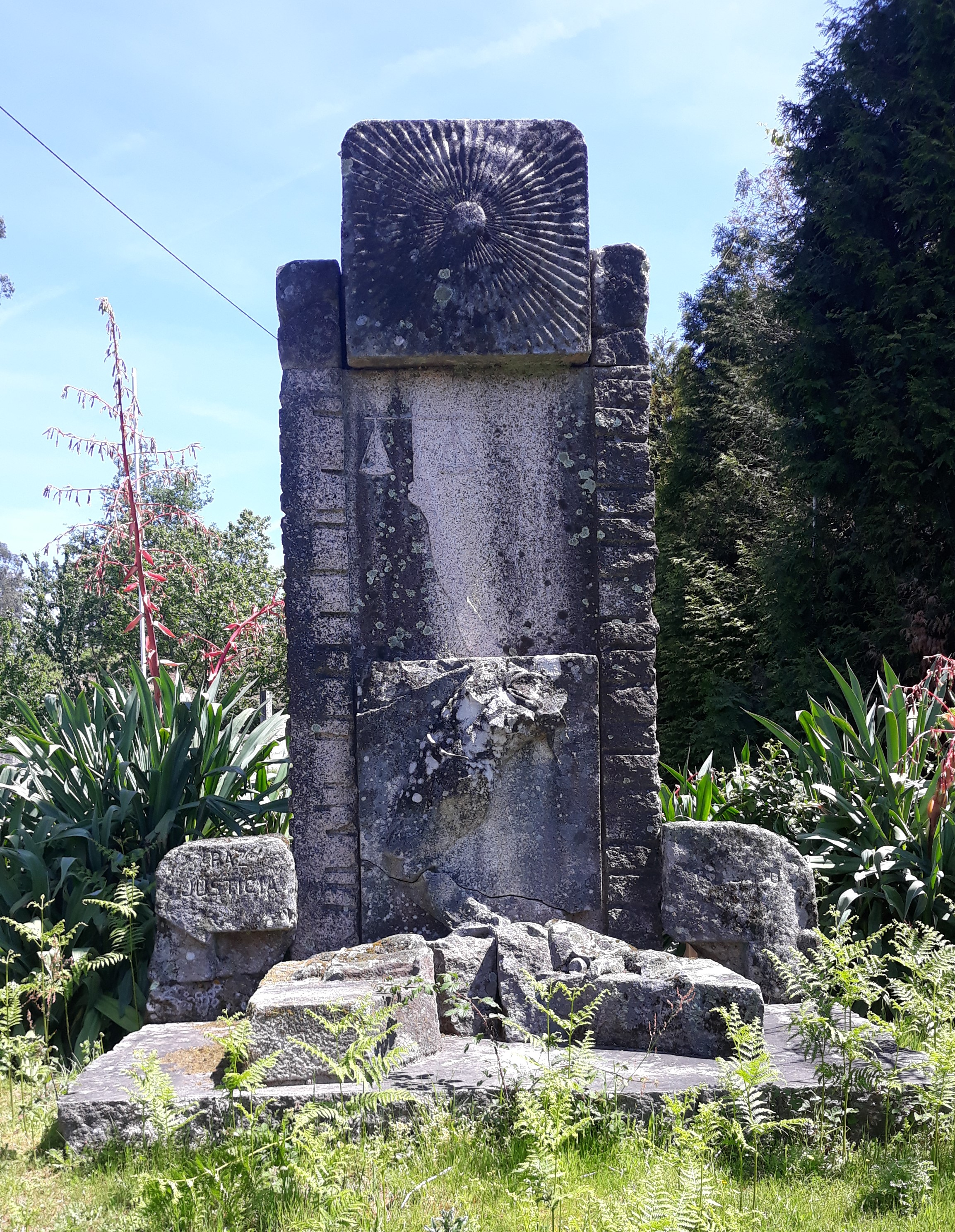 Imaxe do monumento de Camilo Nogueira "Os mártires de Sobredo"